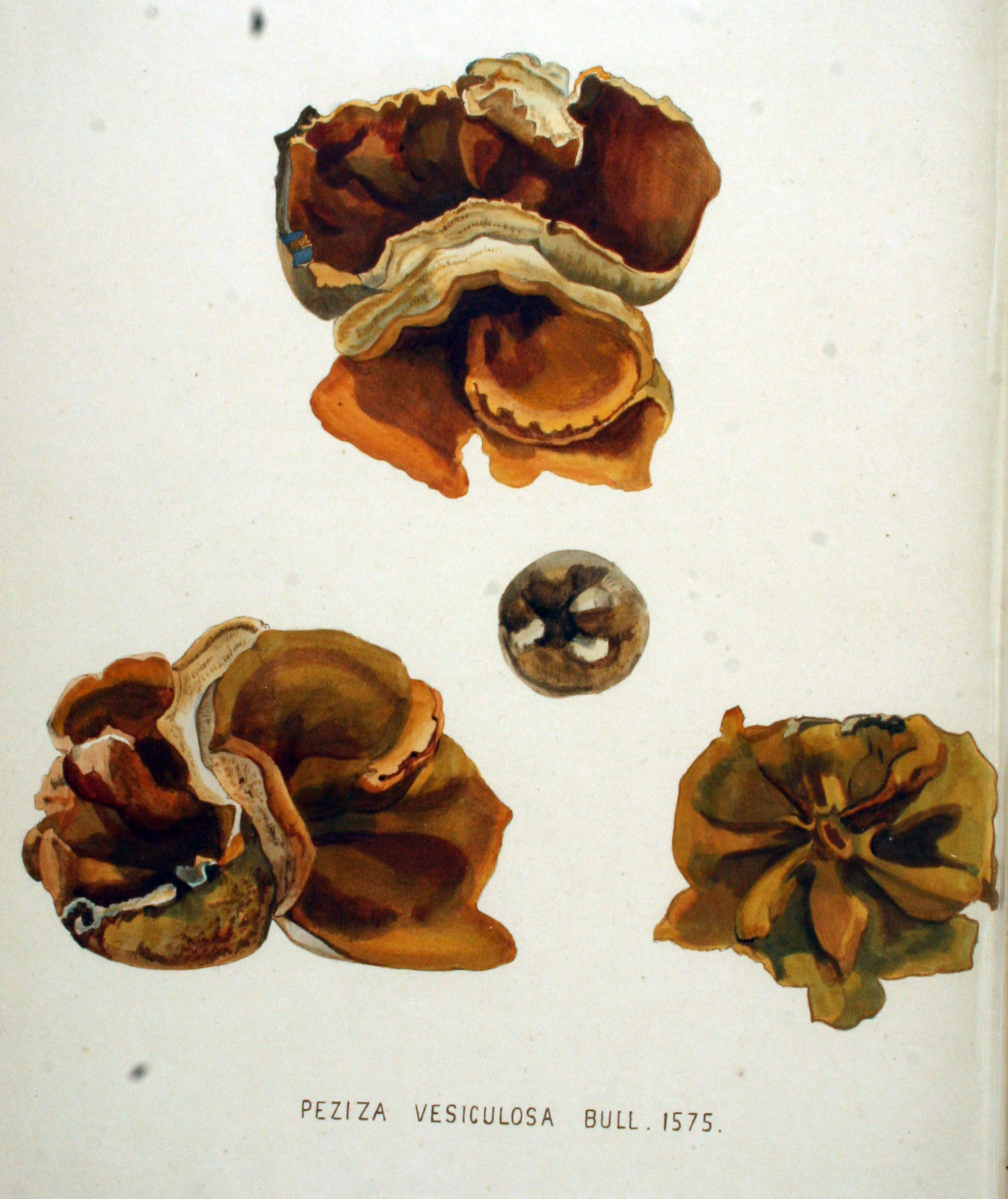 Peziza vesiculosa Bulliard 1790